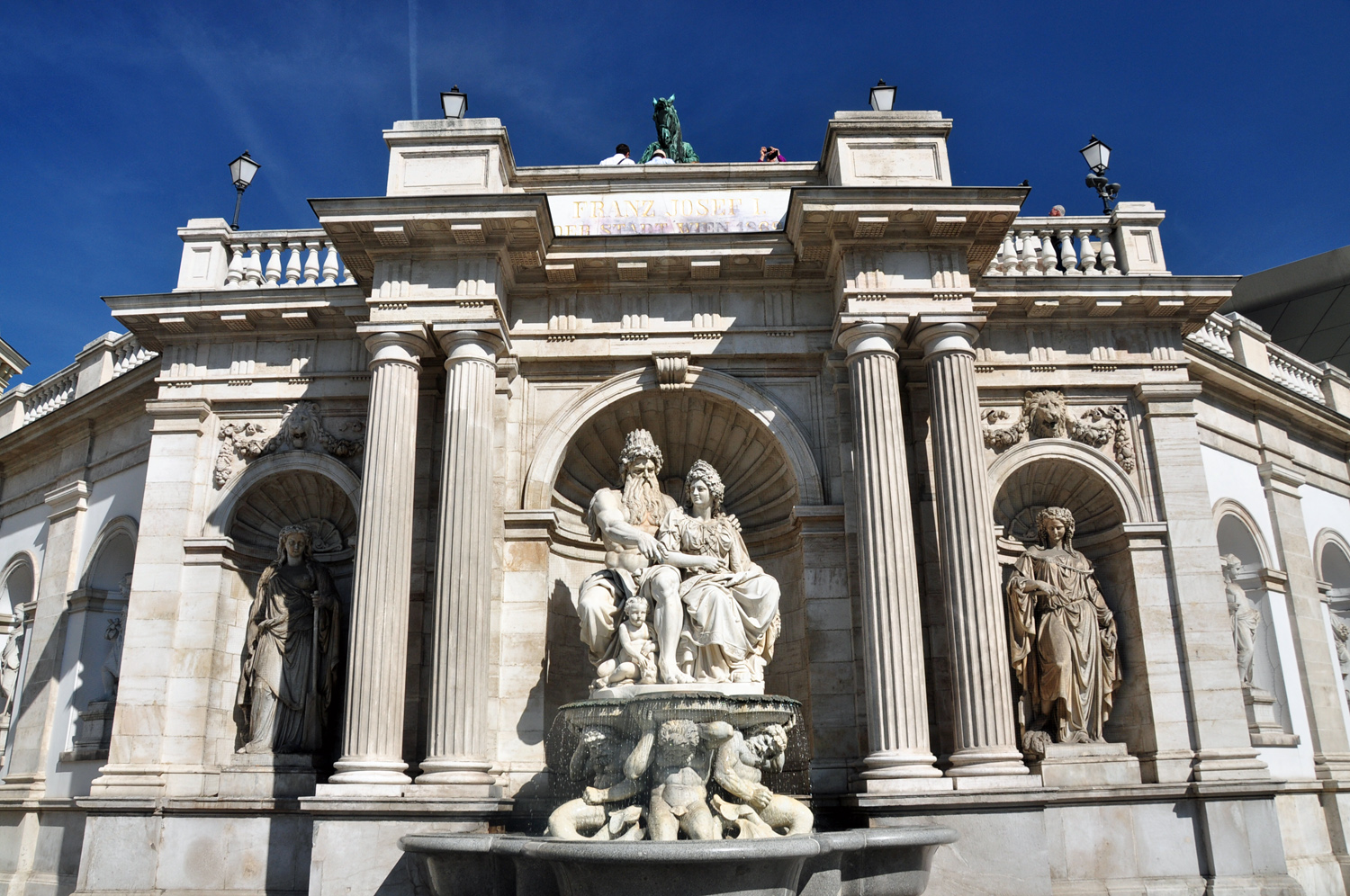 Danubius - Brunnen